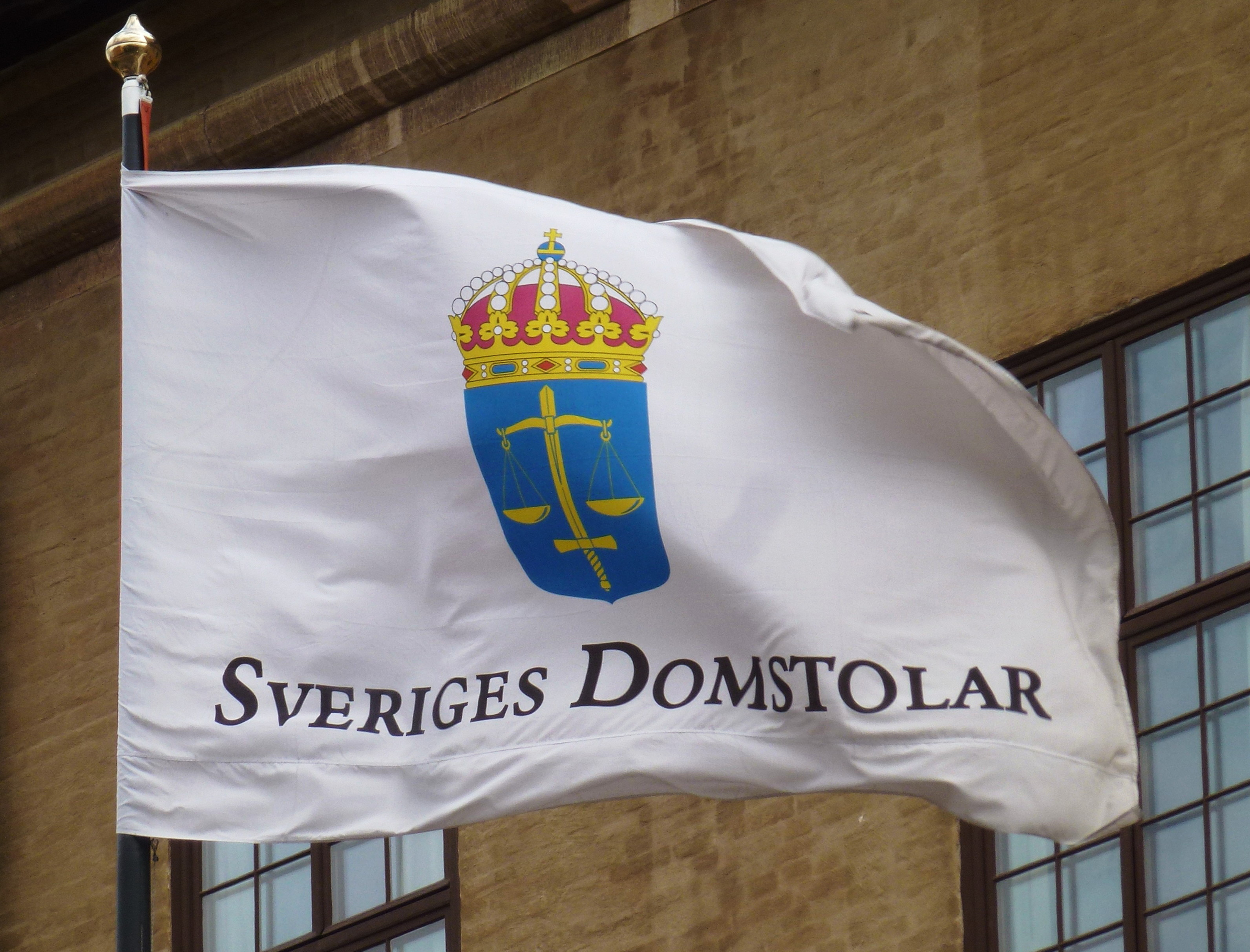 Sveriges Domstolars flagga utanför Stockholms Rådhus